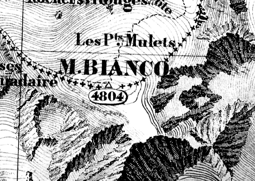 Extrait de la planche de l'Atlas sarde de 1869 conservée à l'IGN. Le document est évidemment maintenant libre de droits, il est conservé à la cartothèque de l'IGN, mais je suis l'auteur du cliché.